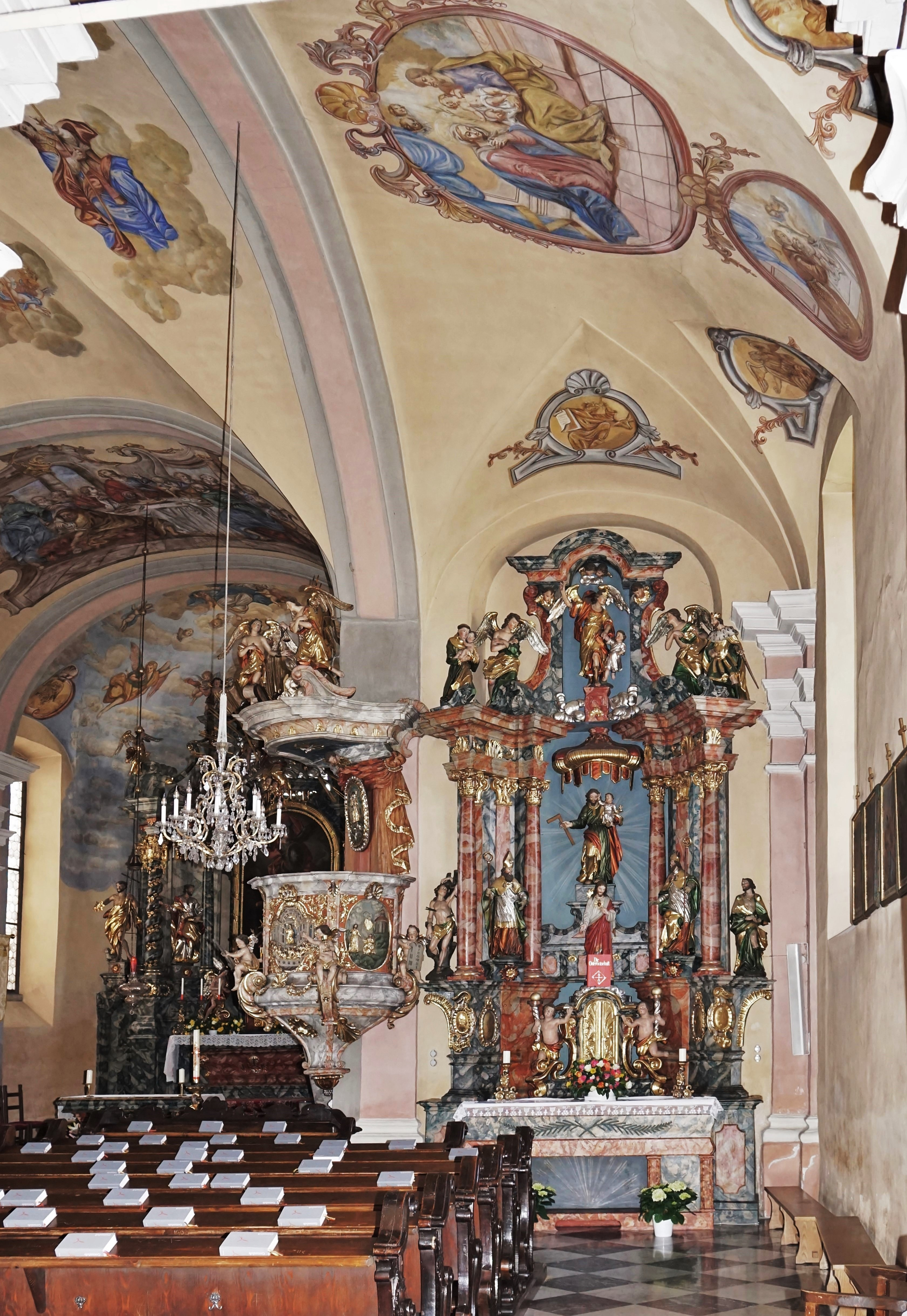 Kath. Pfarrkirche Hll. Michael und Georg Moosburg (Kärnten), Innenansicht des rechtes Seitenschiffs